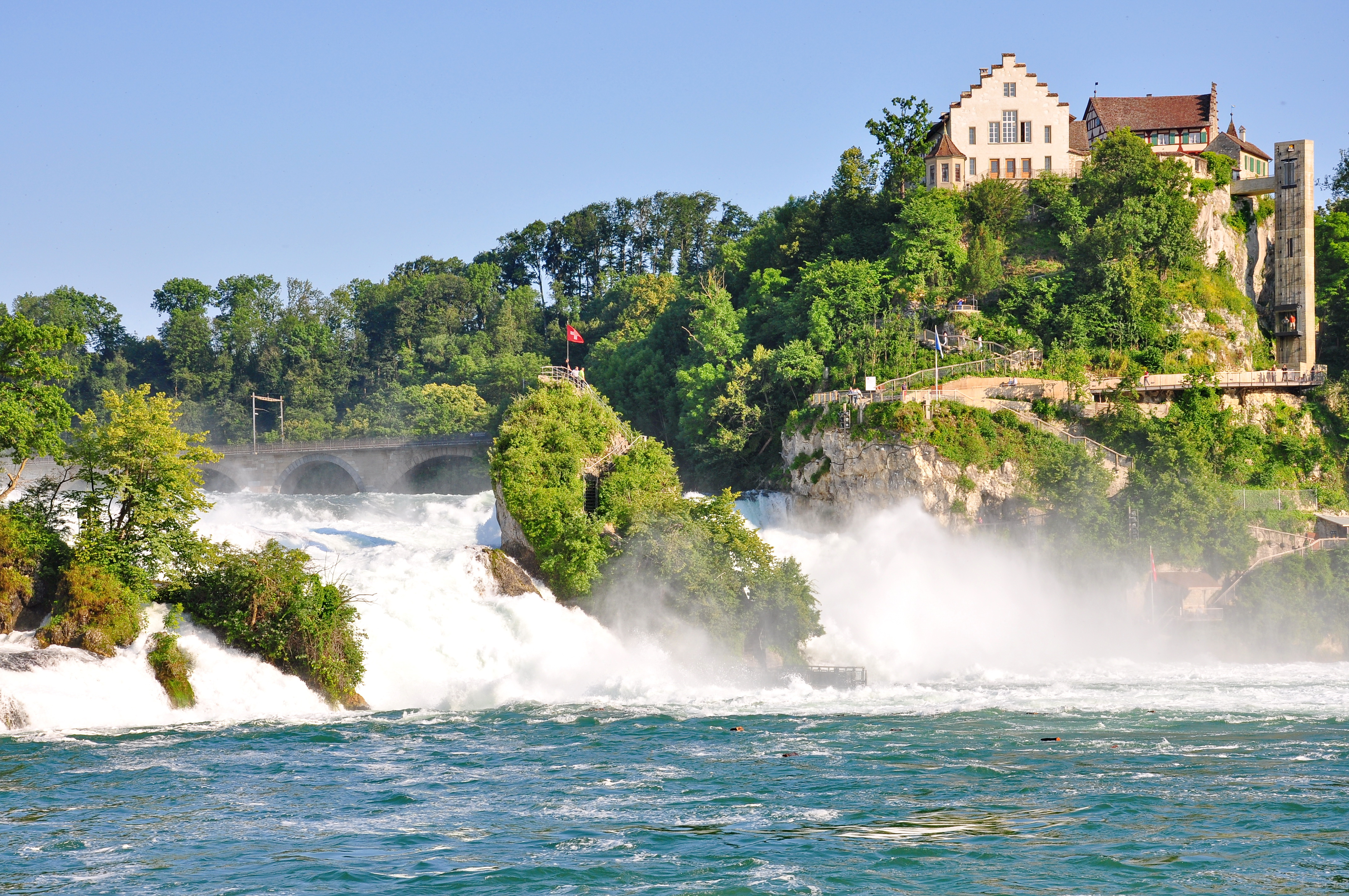 Rheinfall and Schloss Laufen in Laufen-Uhwiesen as seen from Neuhausen am Rheinfall (Switzerland)